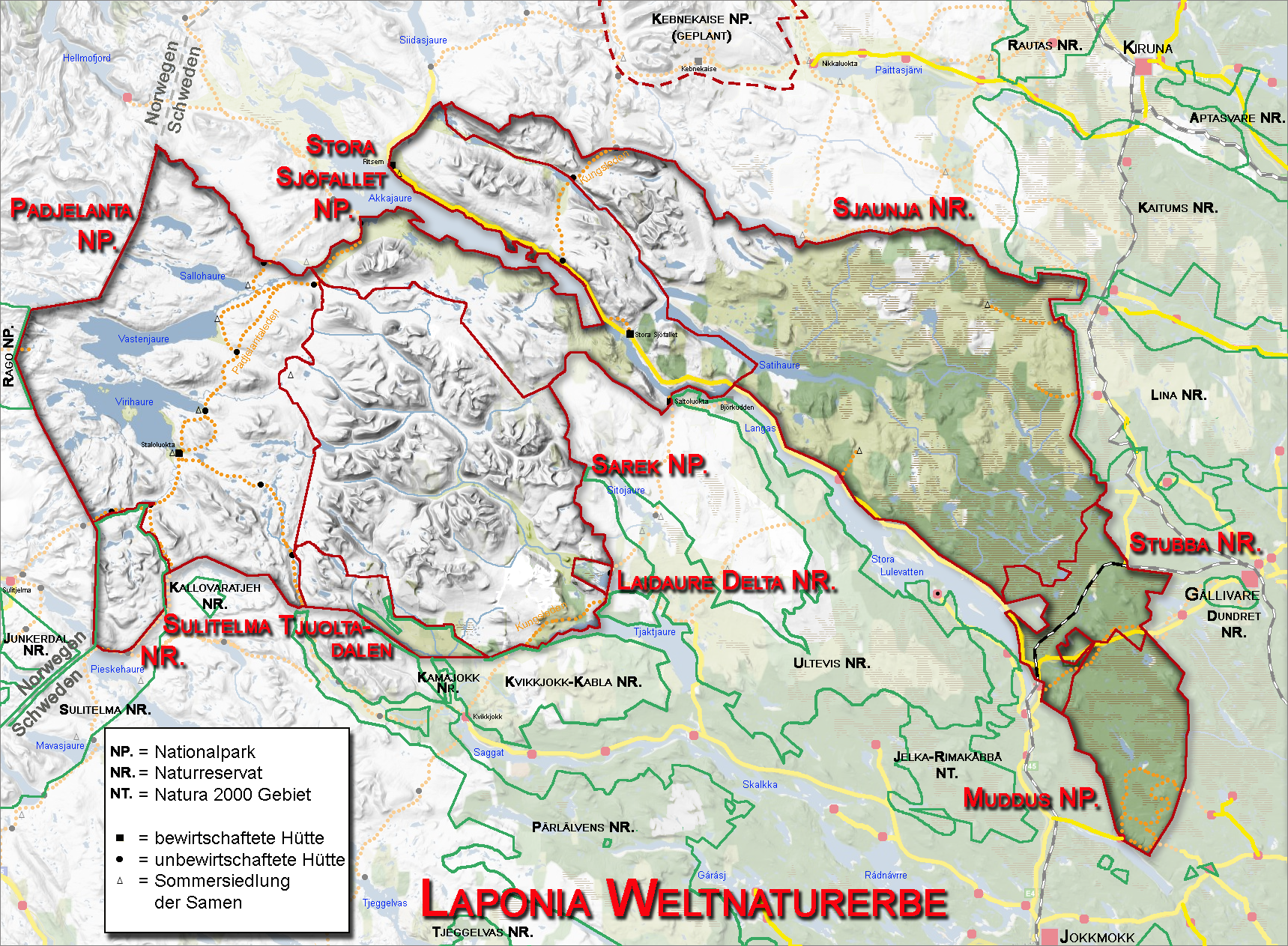 Karte des Weltnaturerbes Laponia mit den Schutzgebieten